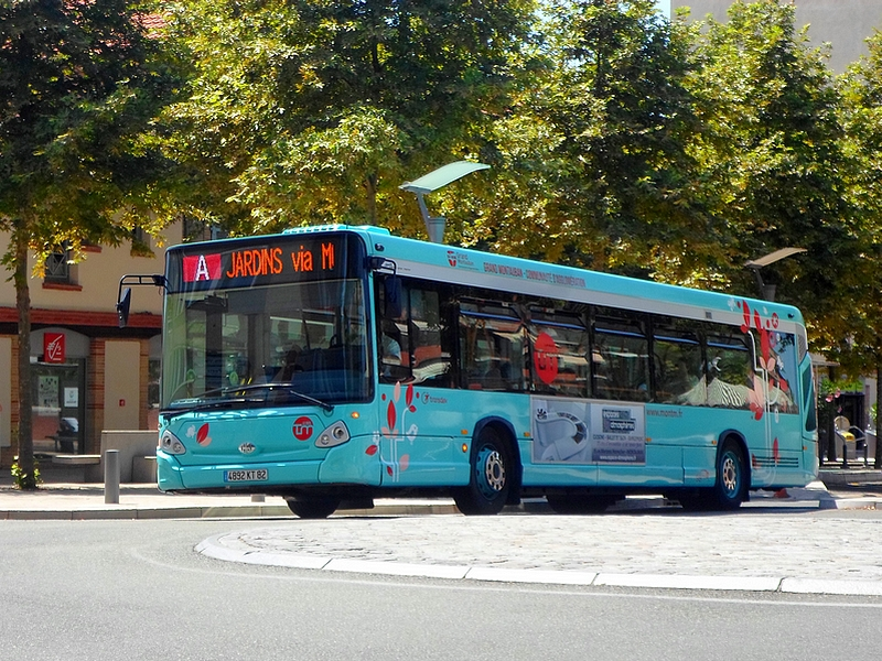 Heuliez GX317 du réseau de bus urbains de Montauban Le Bus TM.